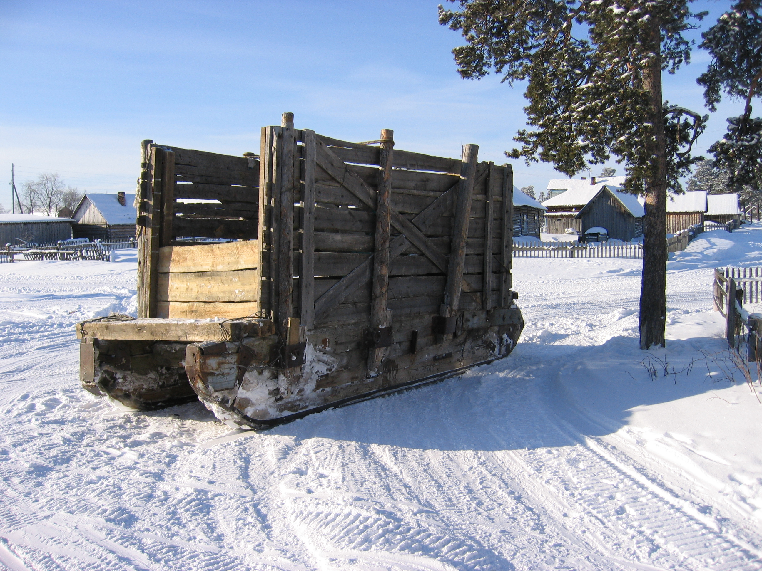 Село Краснощелье, Тракторные волокуши